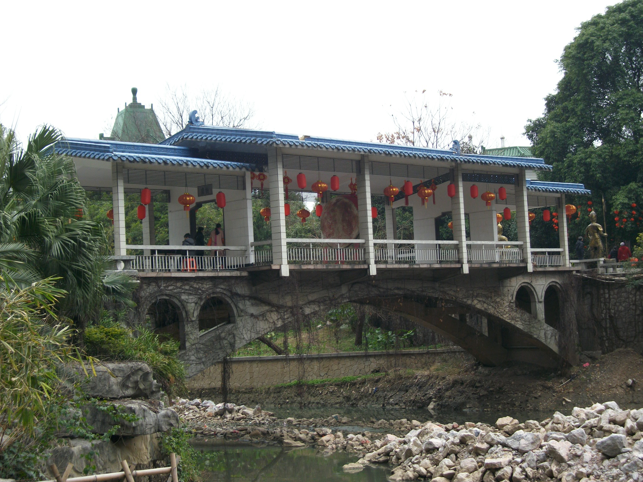 桂林白龙桥（将军桥）。